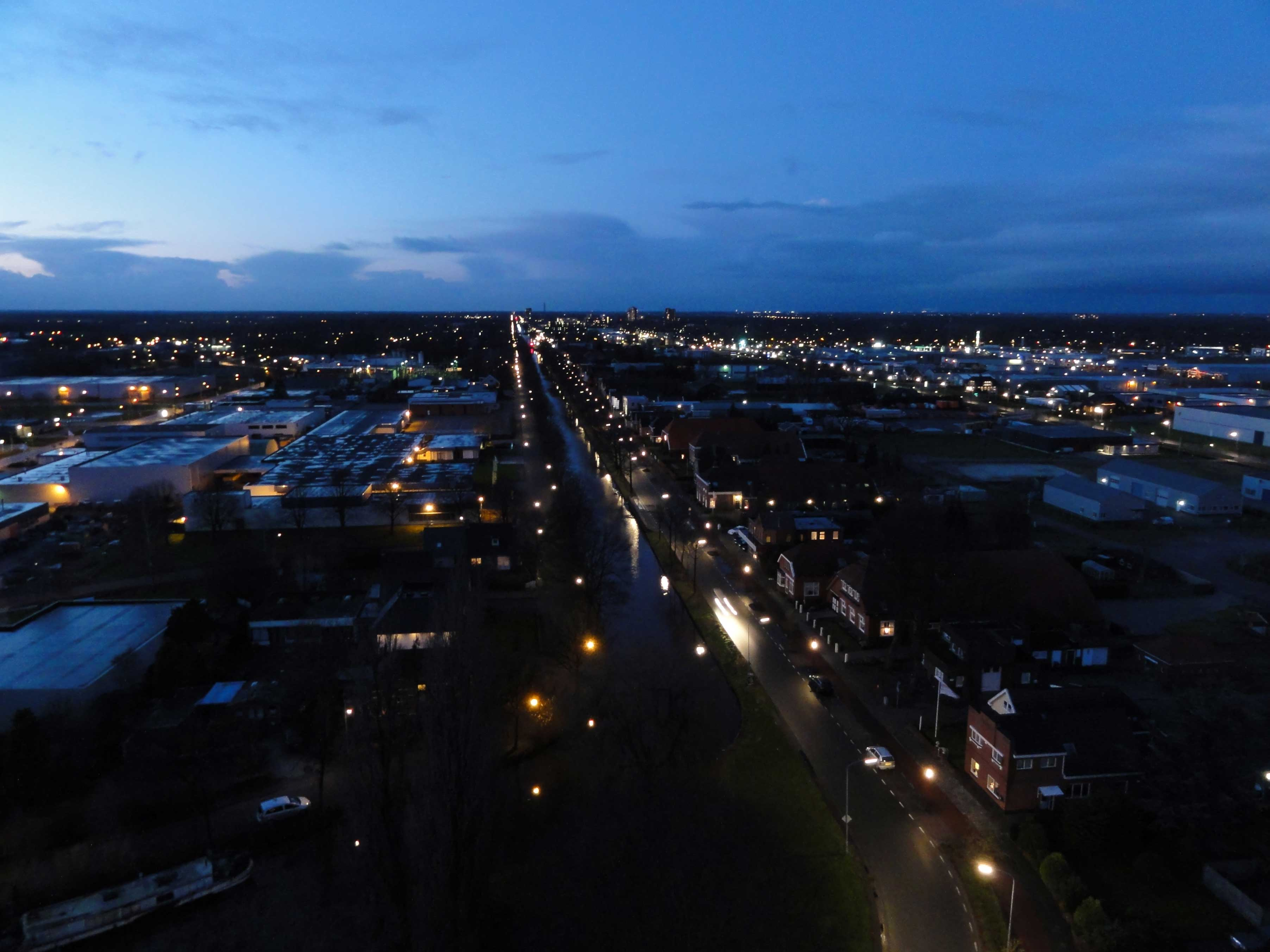 Stadskanaal bij avond